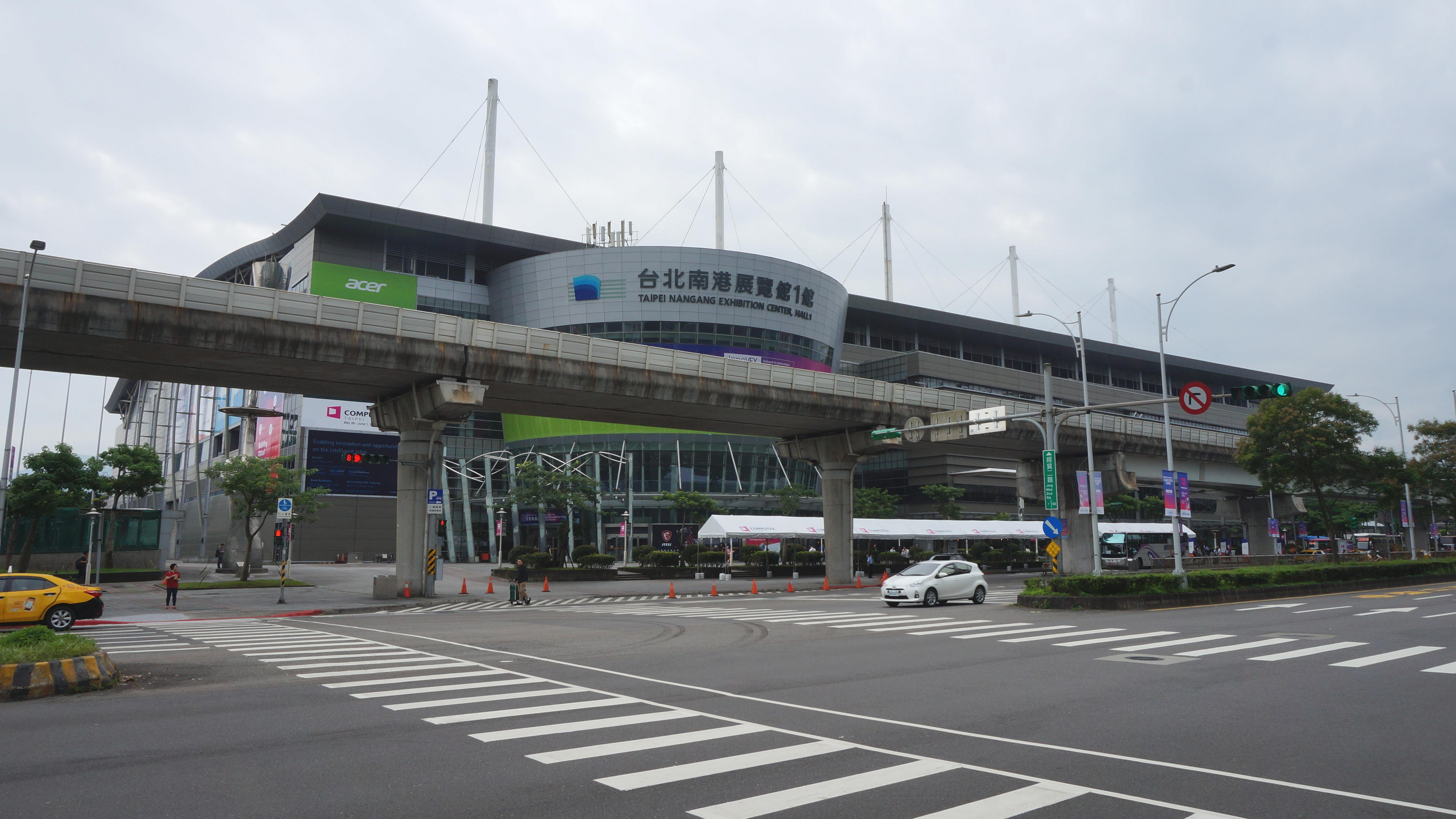 台北南港展覽館1館，2019台北國際電腦展廣告。